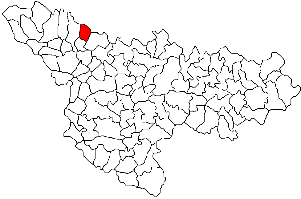 Periam, judetul Timis Licensing Categorie:Hărţi ale judeţului Timiş